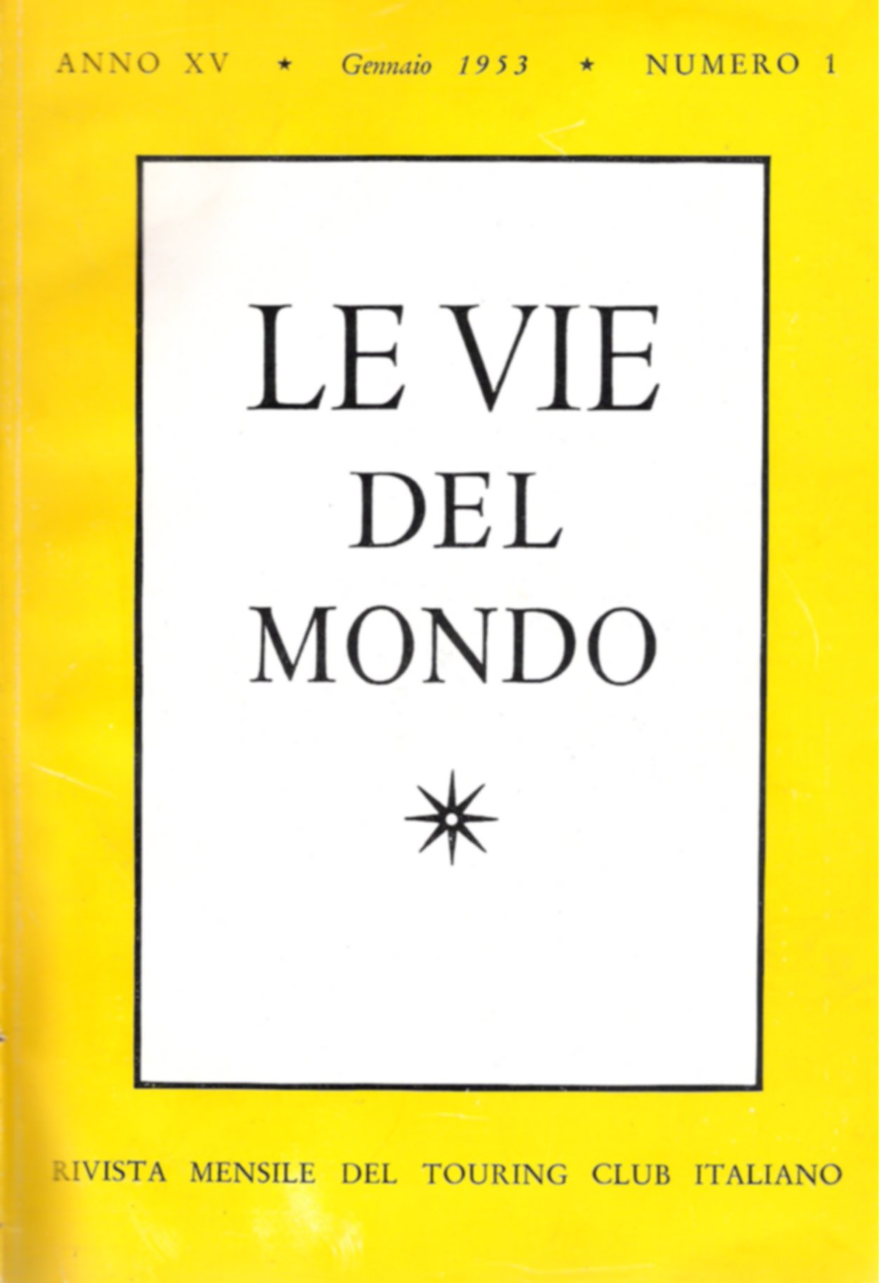 le vie del Mondo